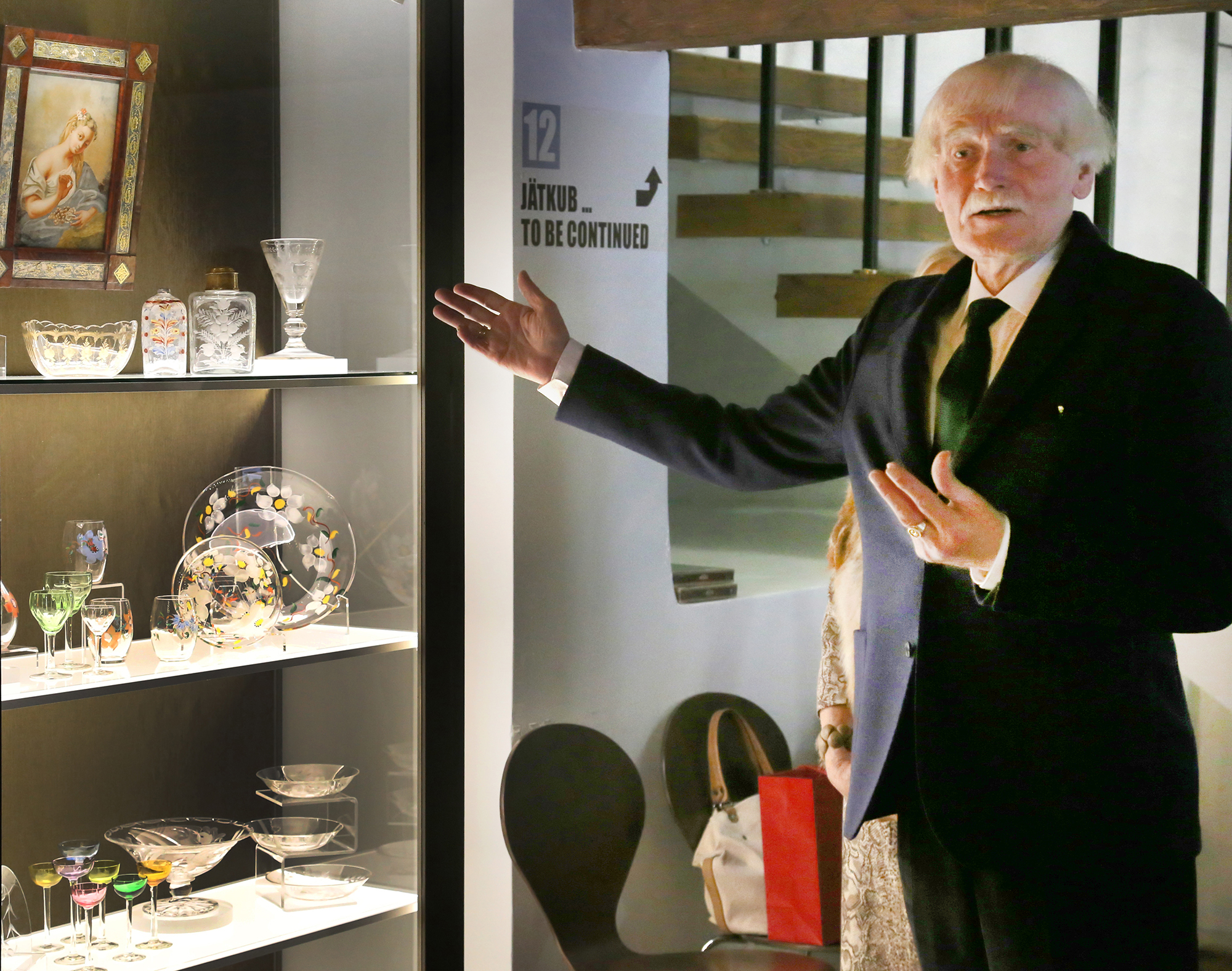 Jüri Kuuskemaa oma näituse avamisel Tallinna Linnamuuseumis 2016